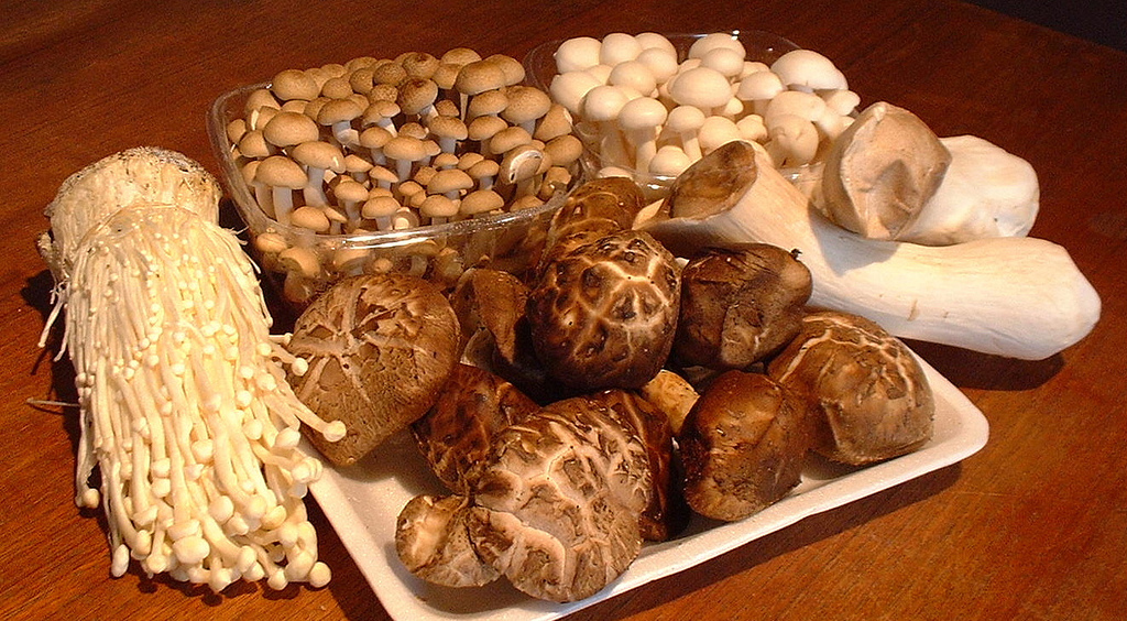 Enoki, Buna-shimeji, Bunapi-shimeji, king oyster mushroom and shiitake.